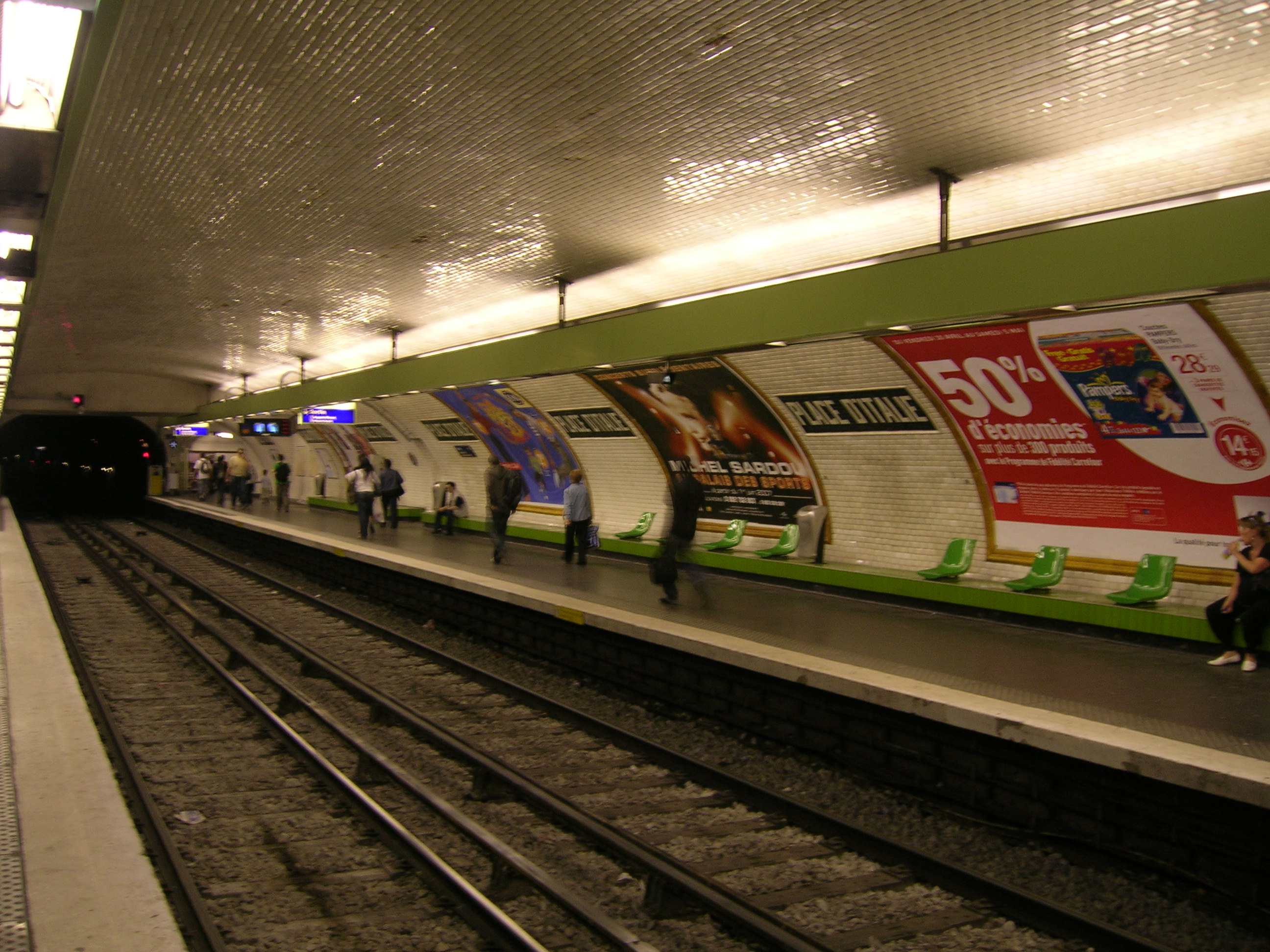 Quais de la station de métro Place d'Italie ligne 7, Paris